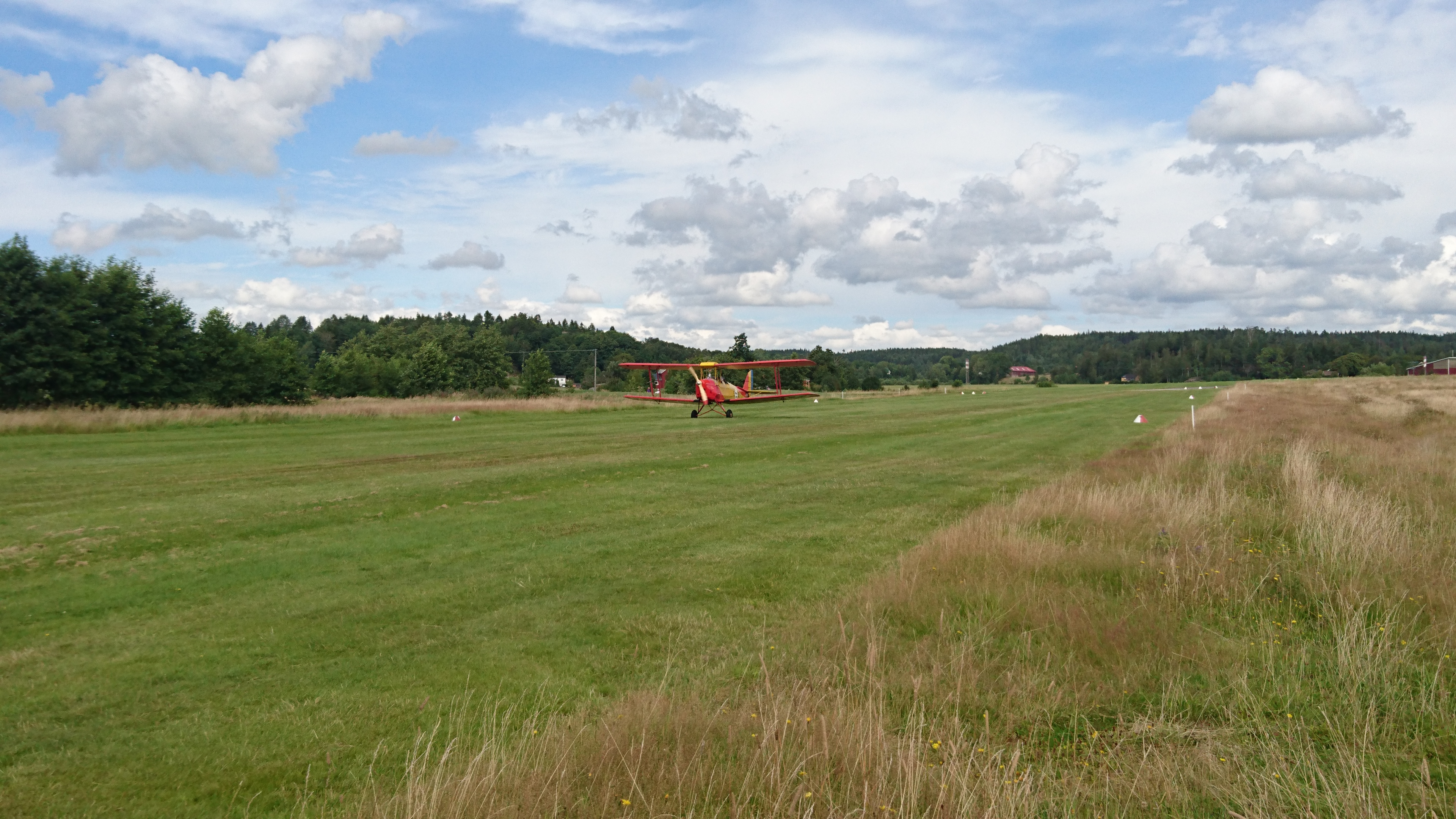 Elsa startar på Rörkärr